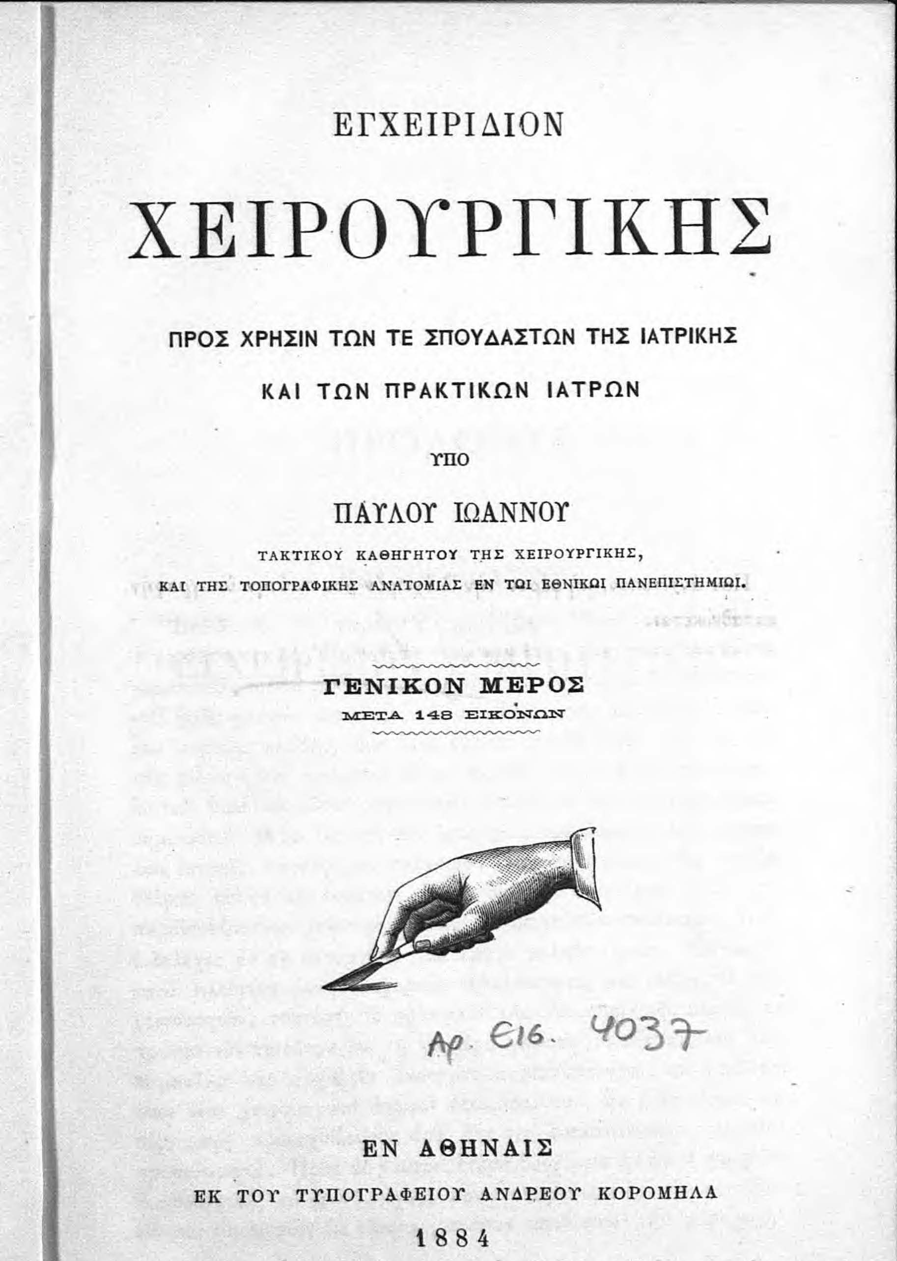 Книга на Павлос Йоану от 1884